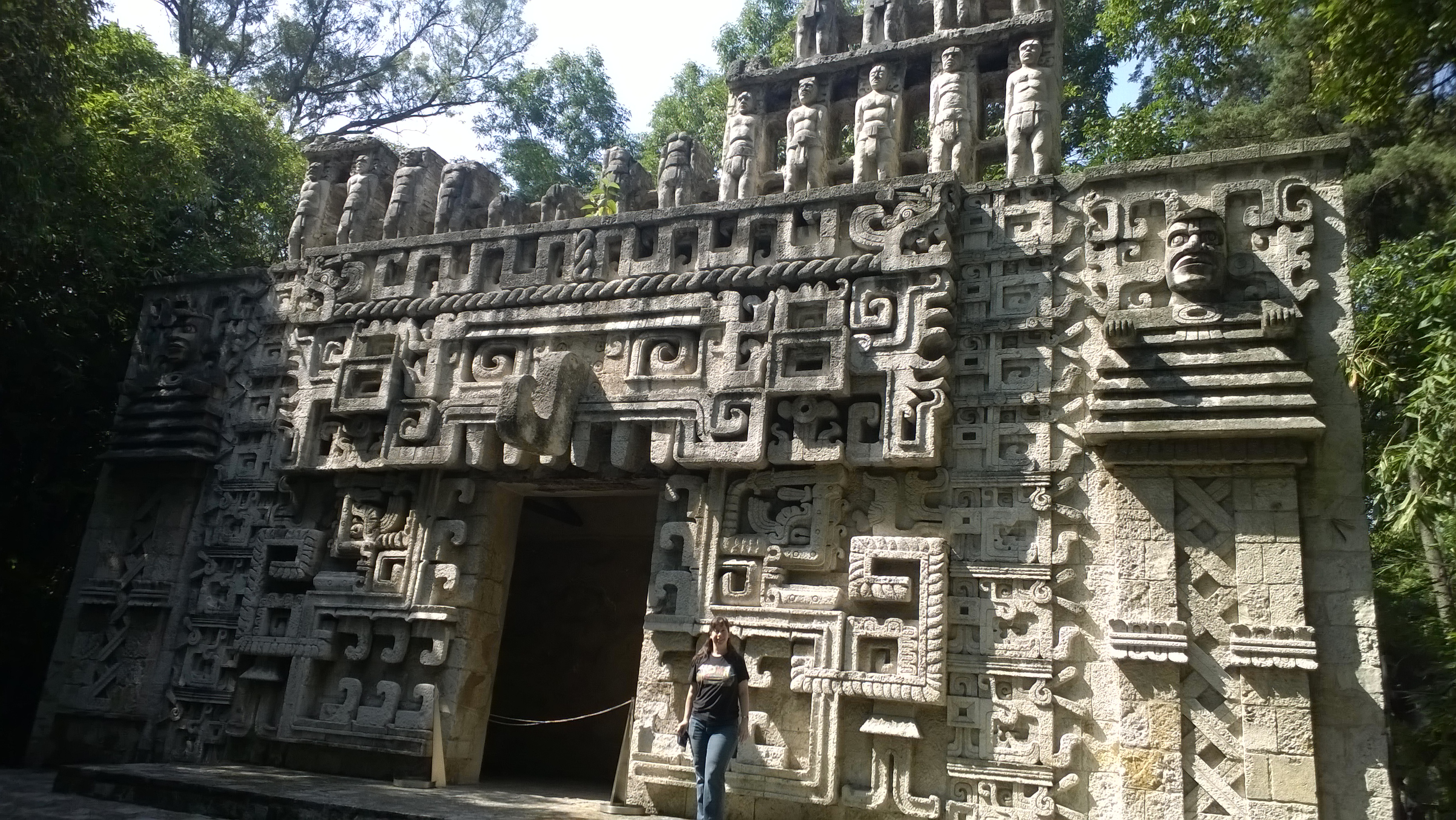 Museo Nacional de Antropología